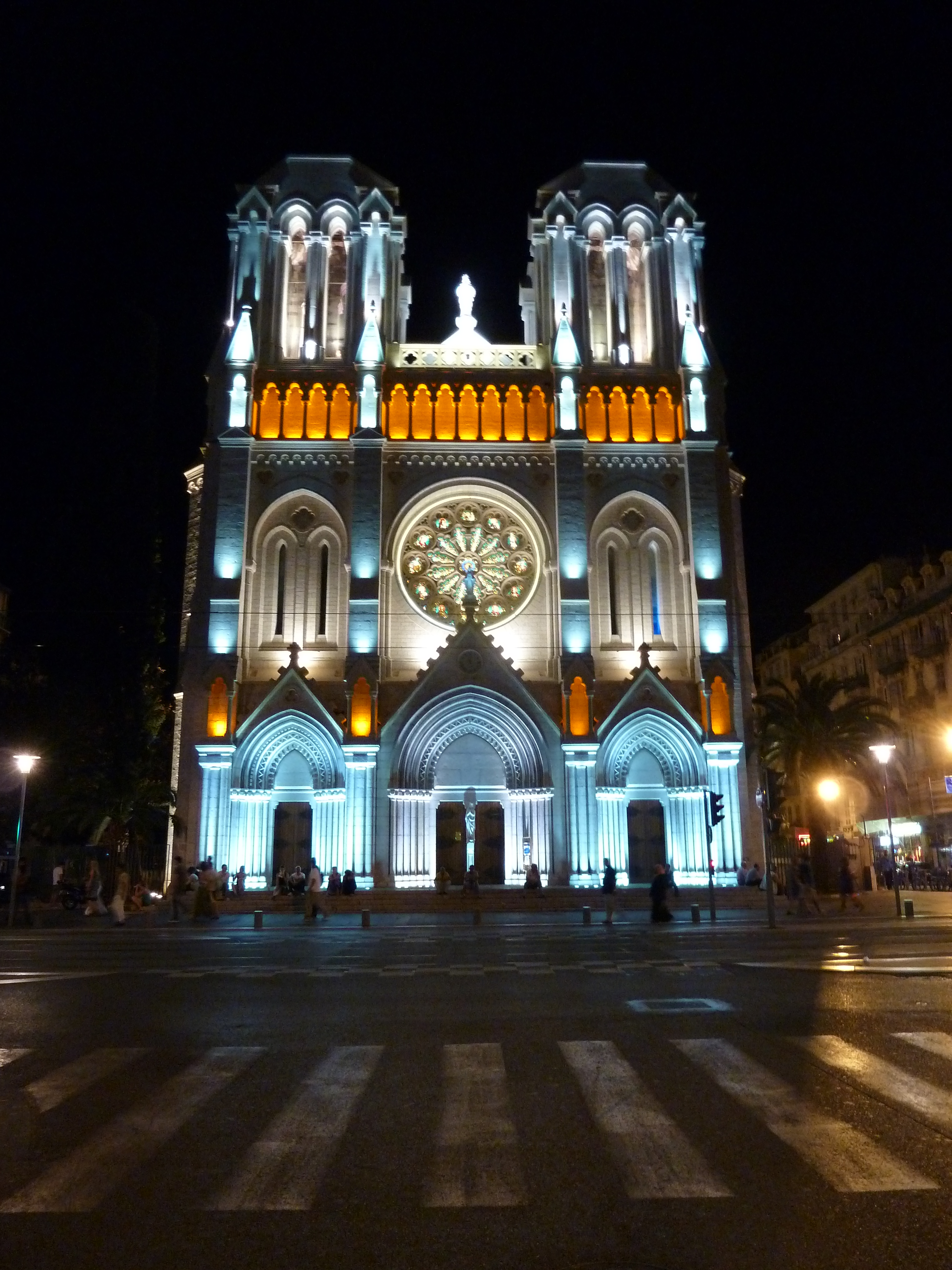 Basilique Notre-Dame de Nice